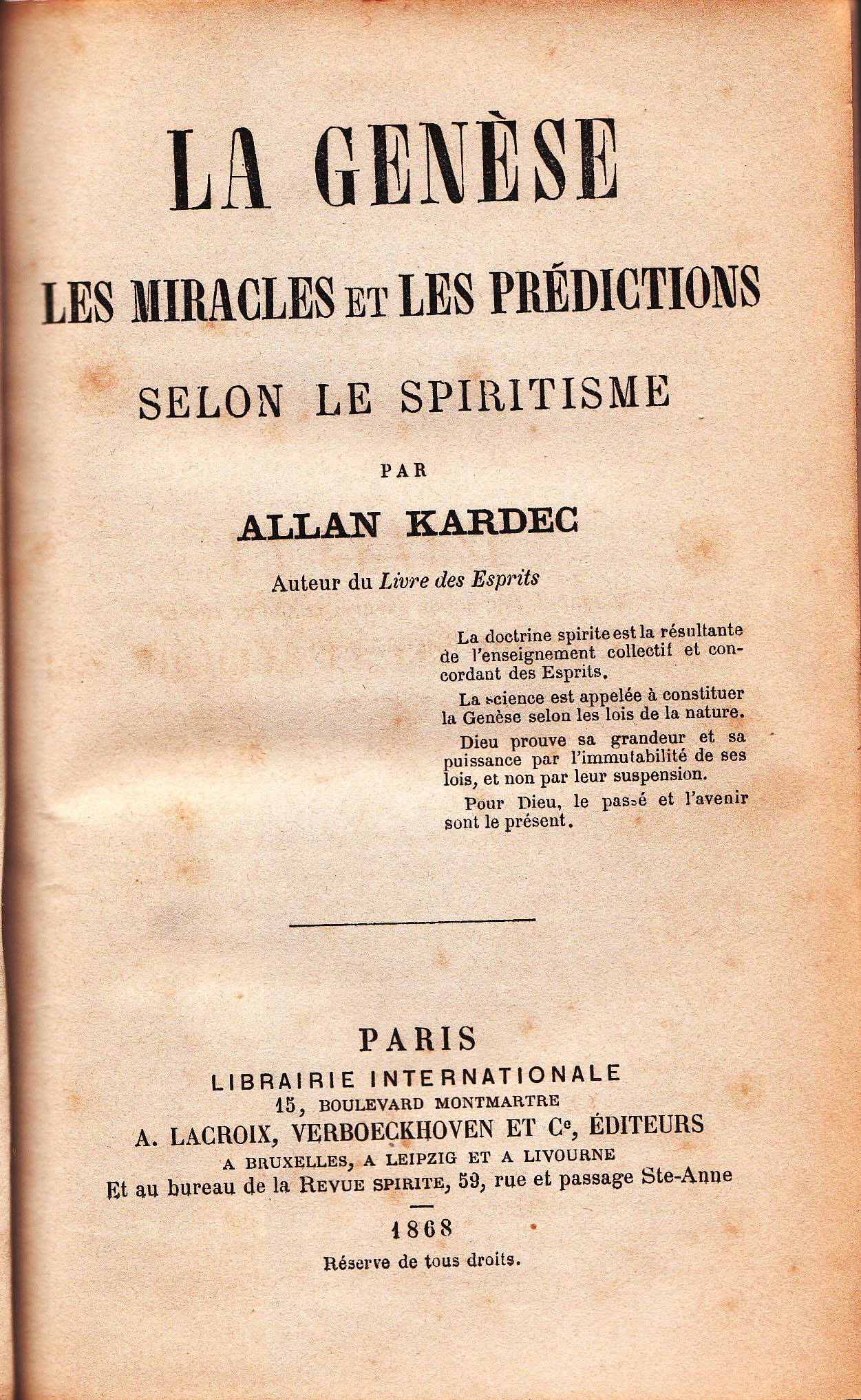 Allan Kardec Page de garde de : La genèse selon le spiritisme. Edition de 1868.